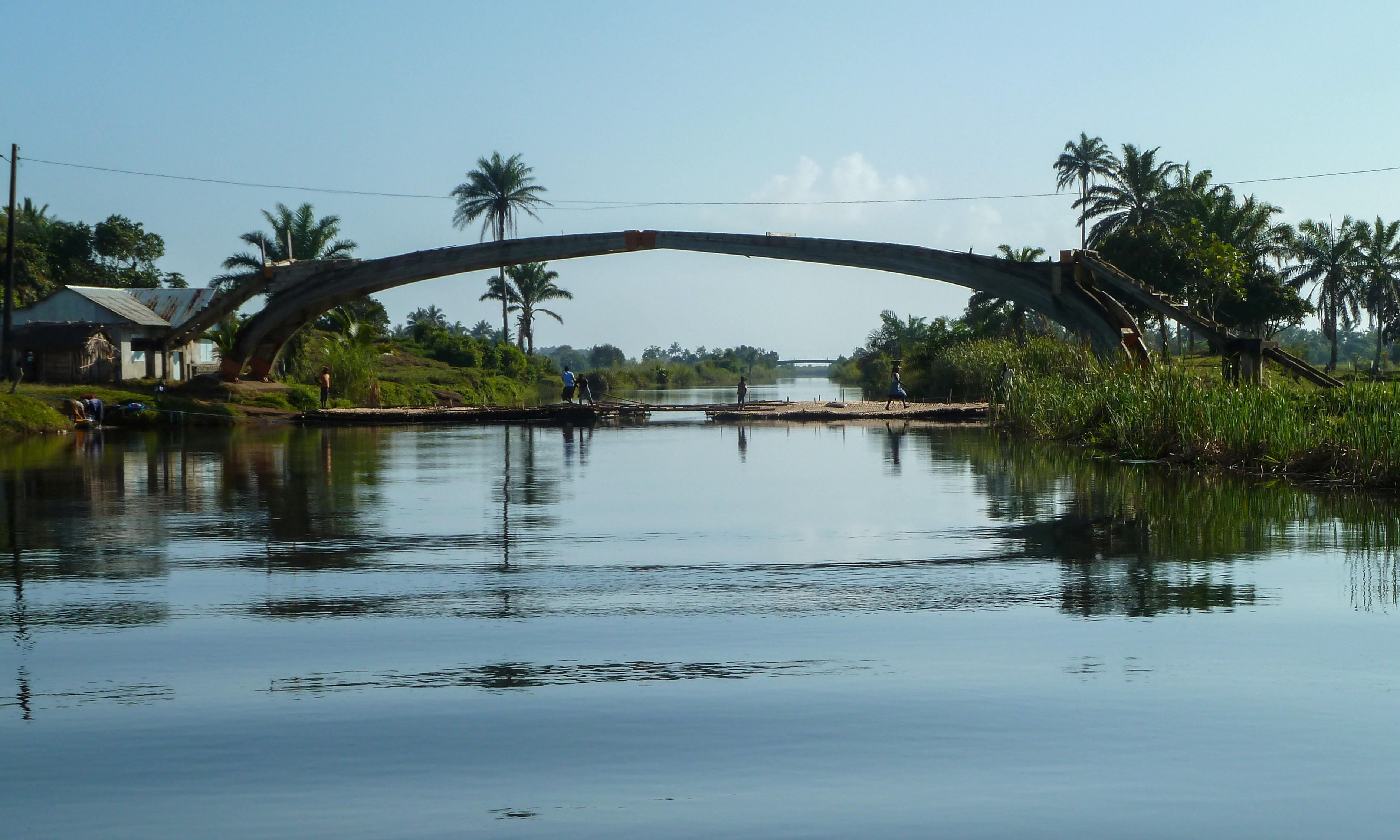 Door cycloon ingestorte brug over het Canal des Pangalanes bij Mananjary. Eronder is een provisorische bamboebrug aangelegd, die tegen betaling tijdelijk wordt weggehaald voor passerende schepen.